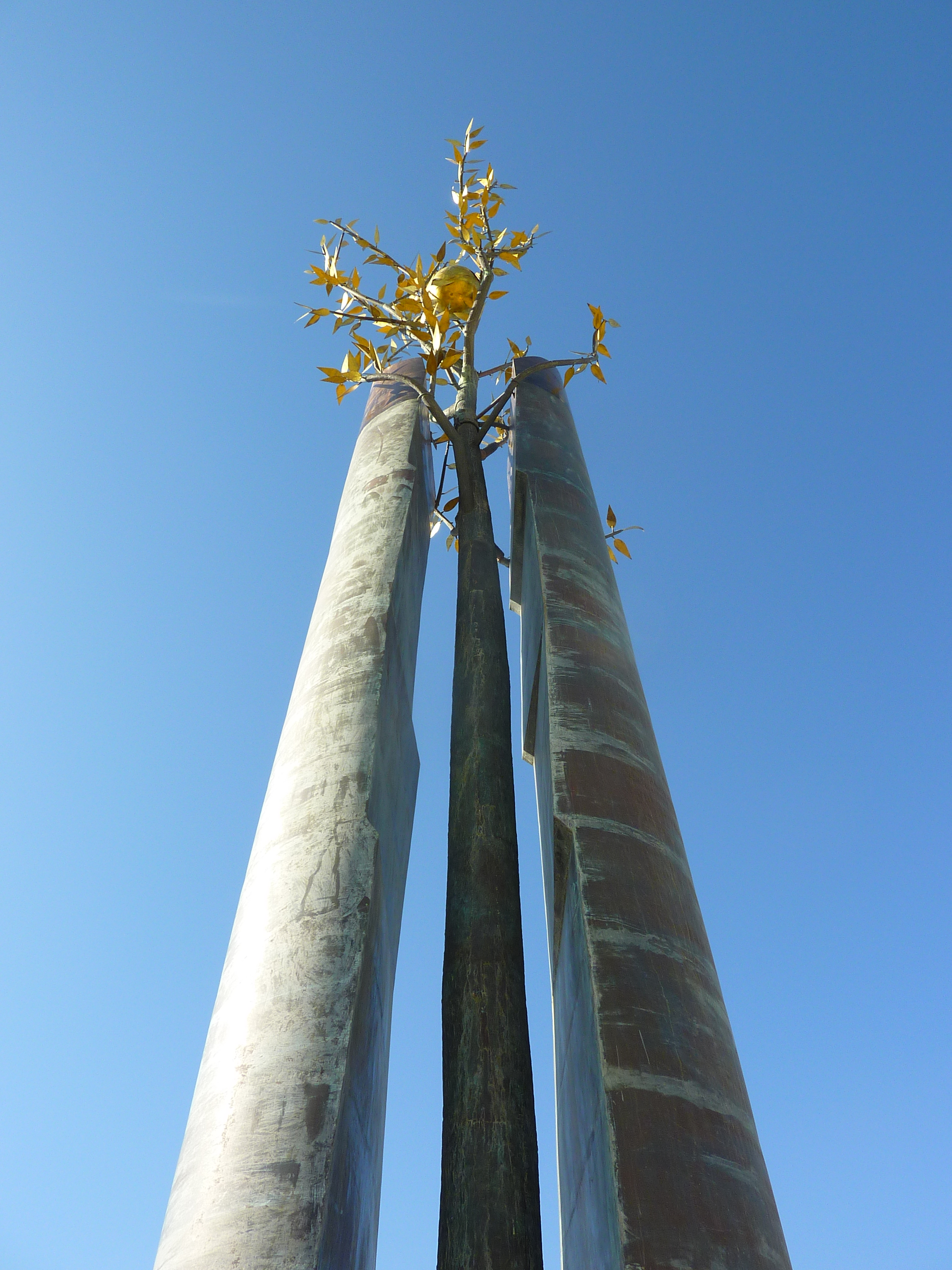 Tolerance monument